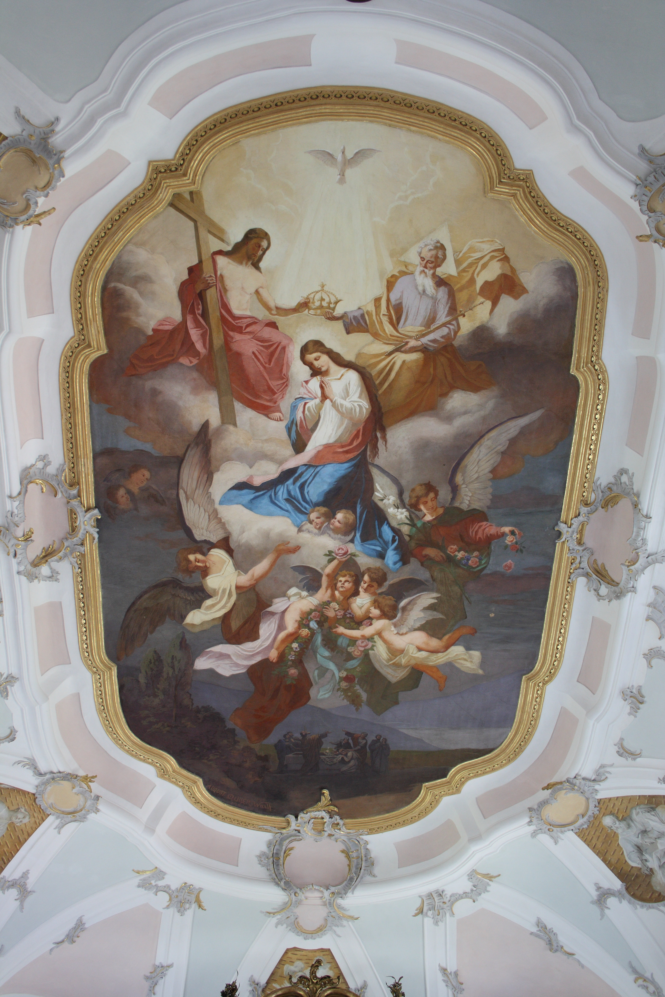 Katholische Pfarrkirche Mariä Himmelfahrt in Ettenbeuren, einem Ortsteil der Gemeinde Kammeltal im Landkreis Günzburg (Bayern), Chorfresko von August Müller-Warth (1893), Darstellung: Marienkrönung August Müller-Warth (1864–1943) Alternative namesAugustin Müller-Warth; August MüllerDescription Swiss painter Date of birth/death19 June 186415 August 1943Location of birth/deathWarth (heute zu Warth-Weiningen TG)Wil SGAuthority control VIAF: 11144782943102030734 GND: 107806959X